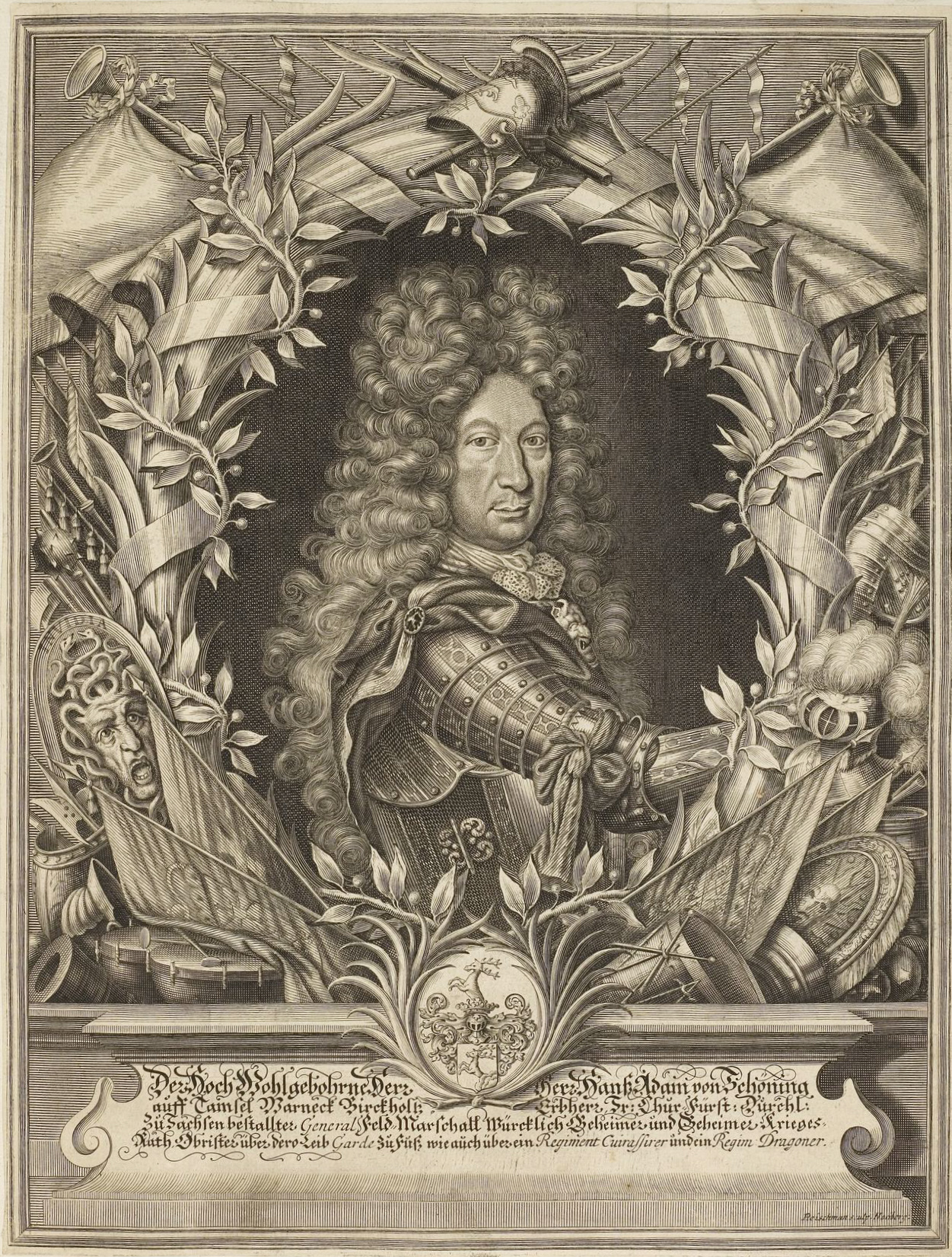 Grafik aus dem Klebeband Nr. 1 der Fürstlich Waldeckschen Hofbibliothek Arolsen Motiv: Hans Adam von Schöning, kurbrandenburgischer und kursächsischer Feldmarschall